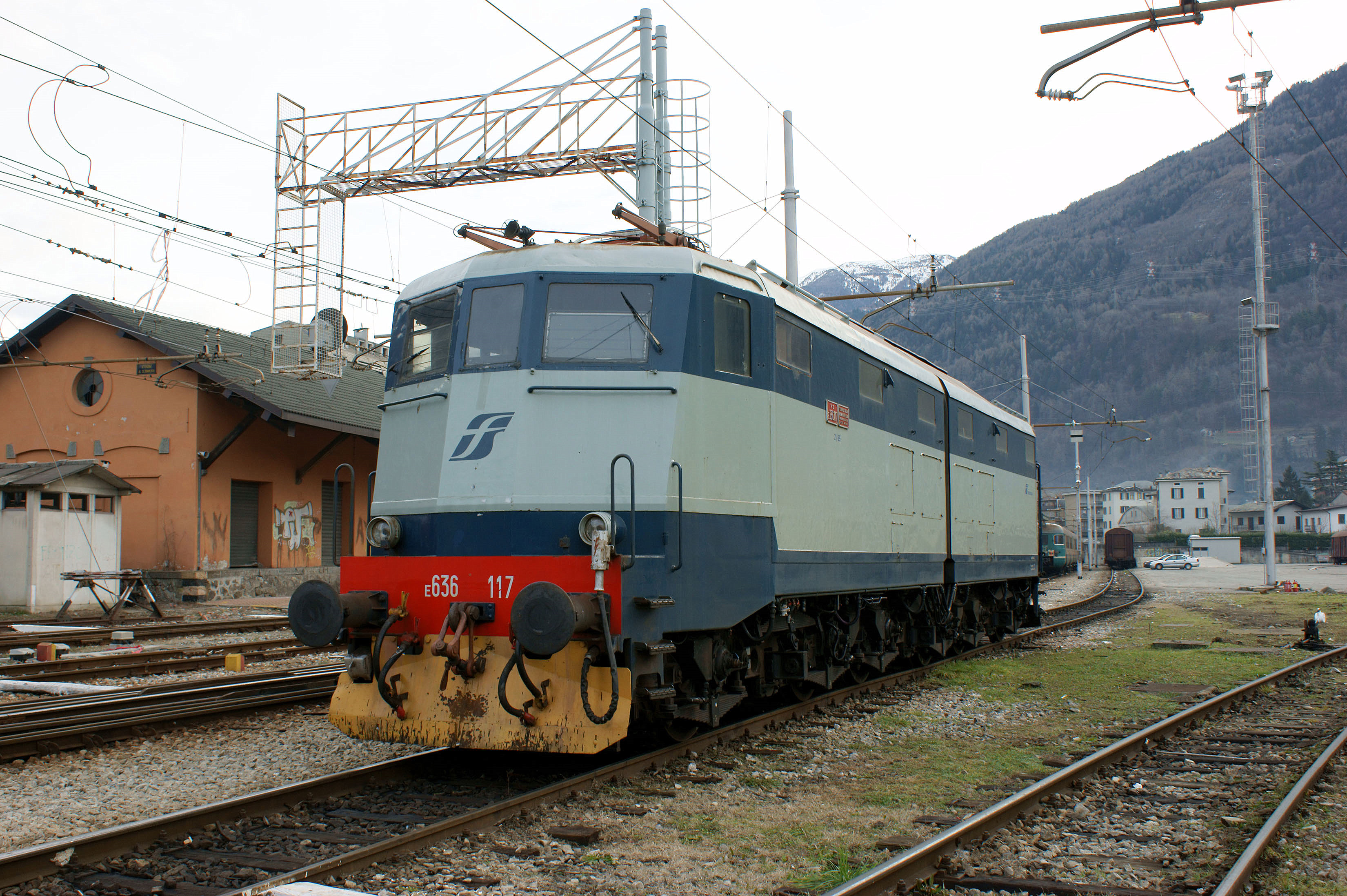 Elektrická lokomotiva E. 636.117 státní železniční společnosti na nádraží v Tiranu, Itálie